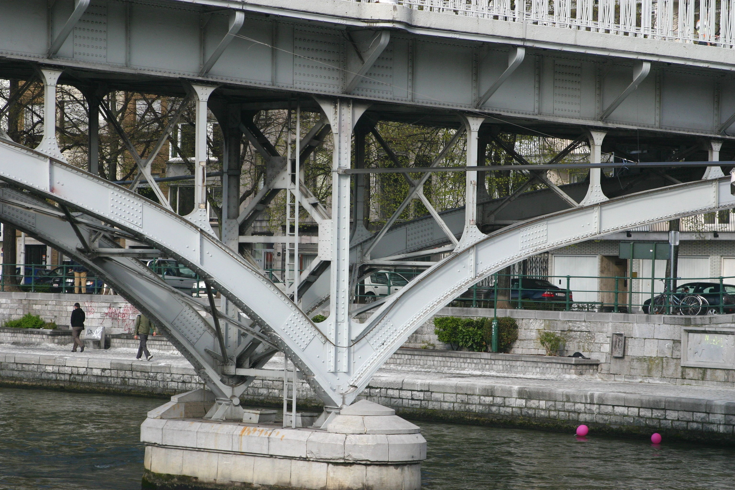 Rietse Flosspilier mat Opleeër. Kategorie:Brécken an der Belsch